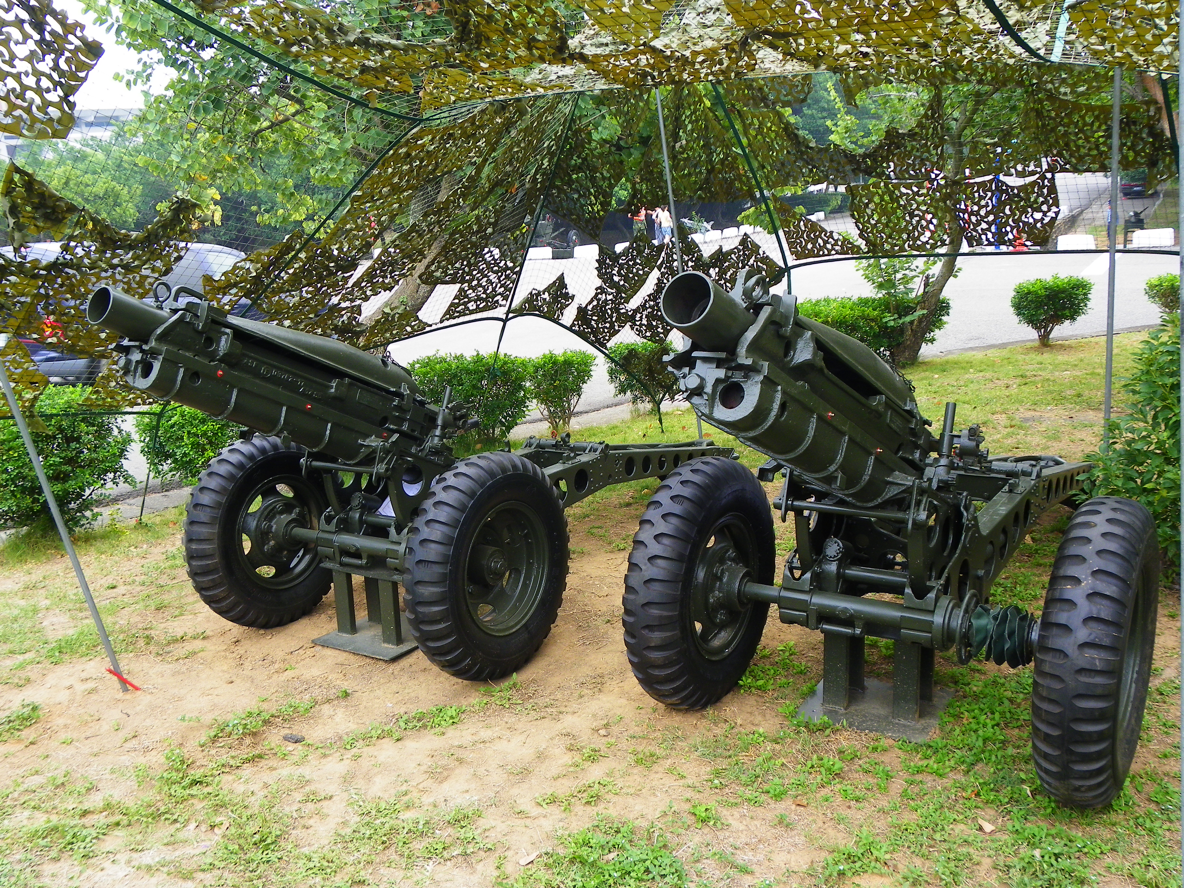 成功嶺營區以野戰陣地風展示兩門裝備M8空降用砲架的M116 75mm榴彈砲，因輕量易於搬運，中華民國陸軍作為山砲運用。抗戰中起先後接收空降型637門、野戰砲型125門，播遷來臺後亦長期配屬於外島，部分共軍擄獲火砲後交由北越使用。